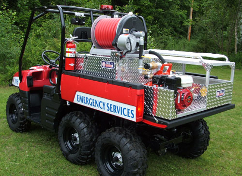 ATV Skid Unit